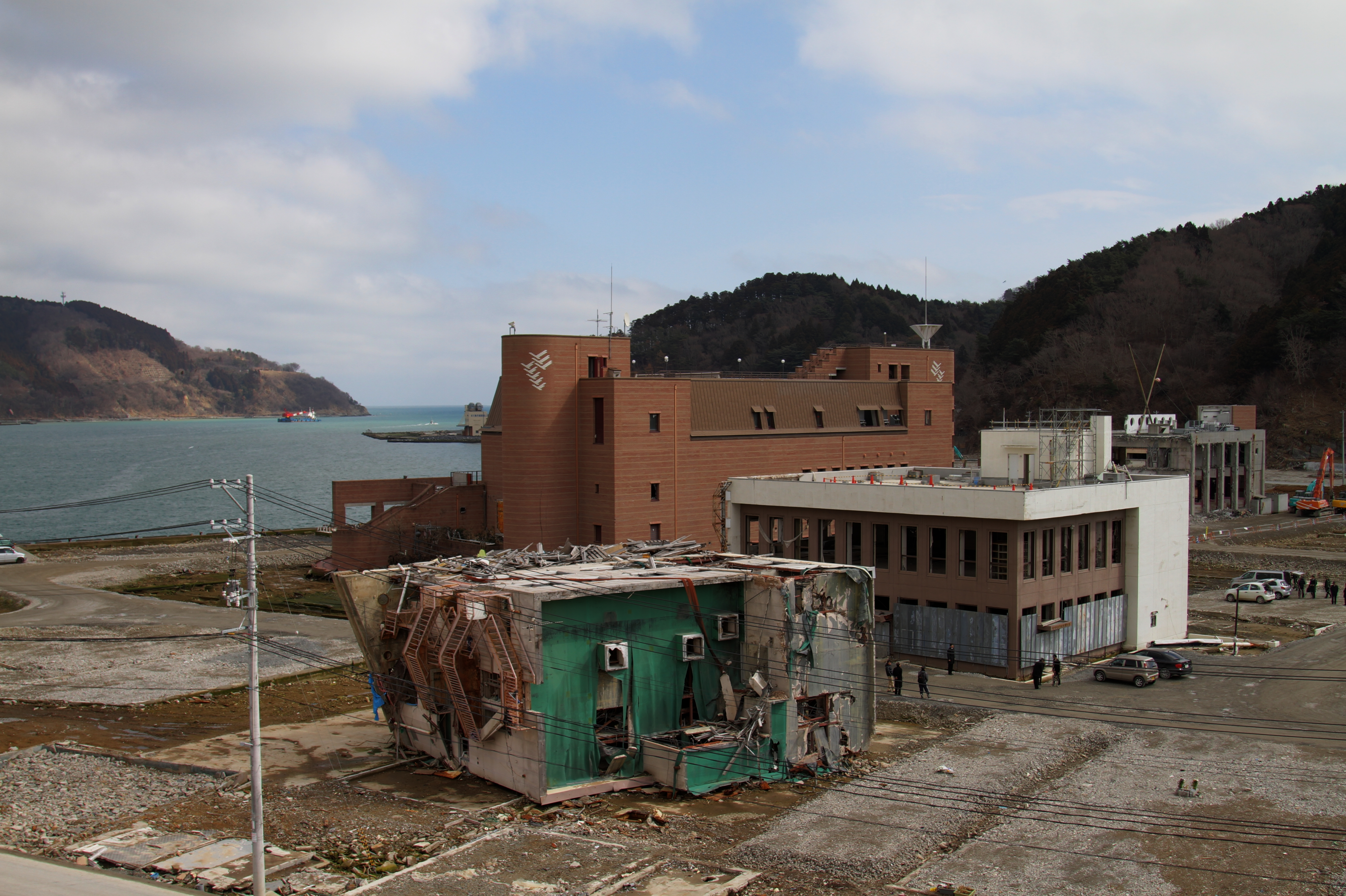 Onagawahama, Onagawa, Oshika District, Miyagi Prefecture 986-2261, Japan